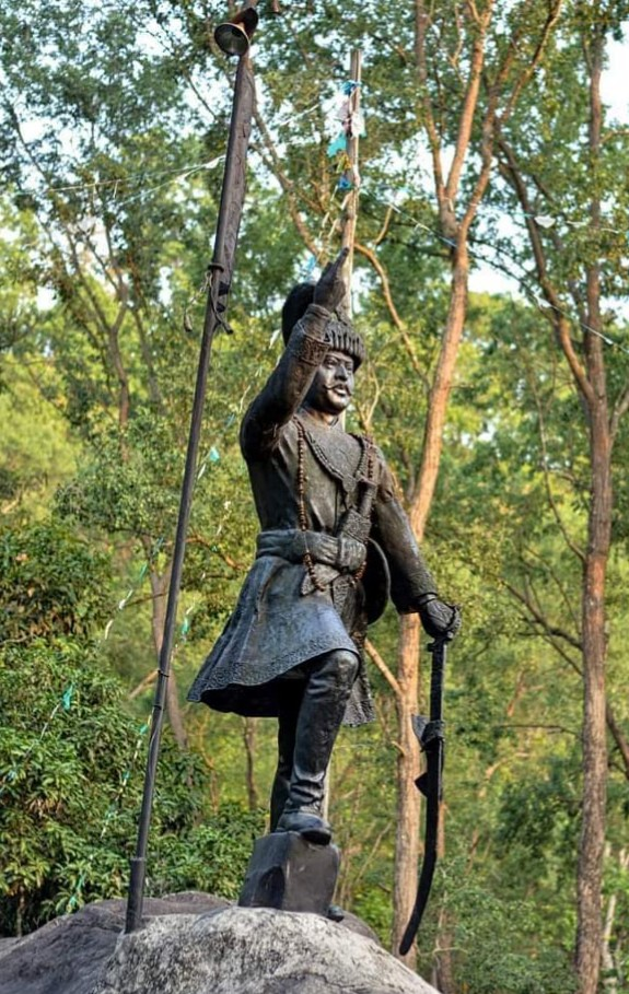 नेपाली: Prithvi smarak Devighat